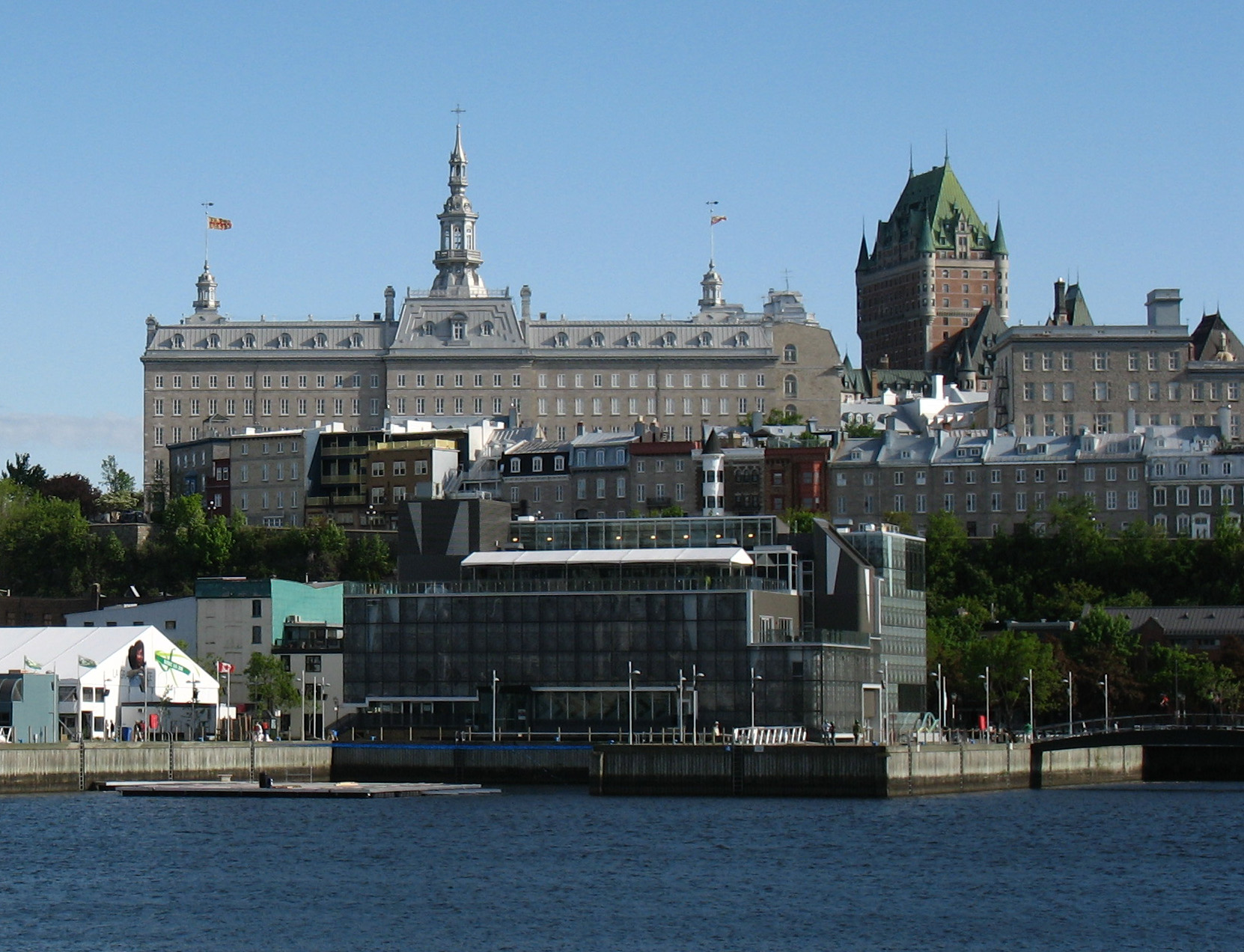 Séminaire de Québec vu du Vieux-Port de Québec, Québec, Canada. Au premier plan, le bassin Louise et l'Espace 400e, point focal des fêtes du 400e anniversaire de Québec